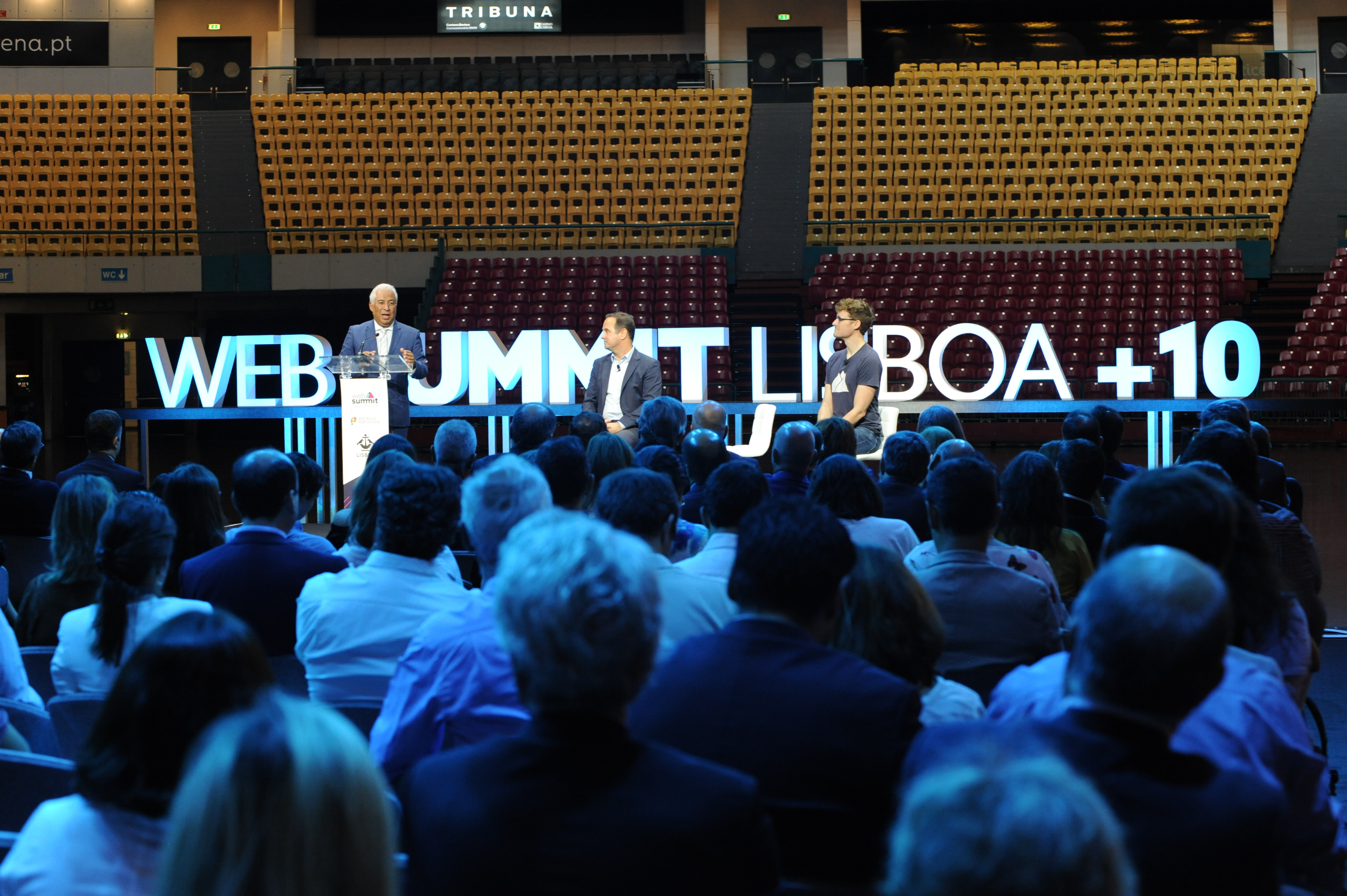 PMM_9360